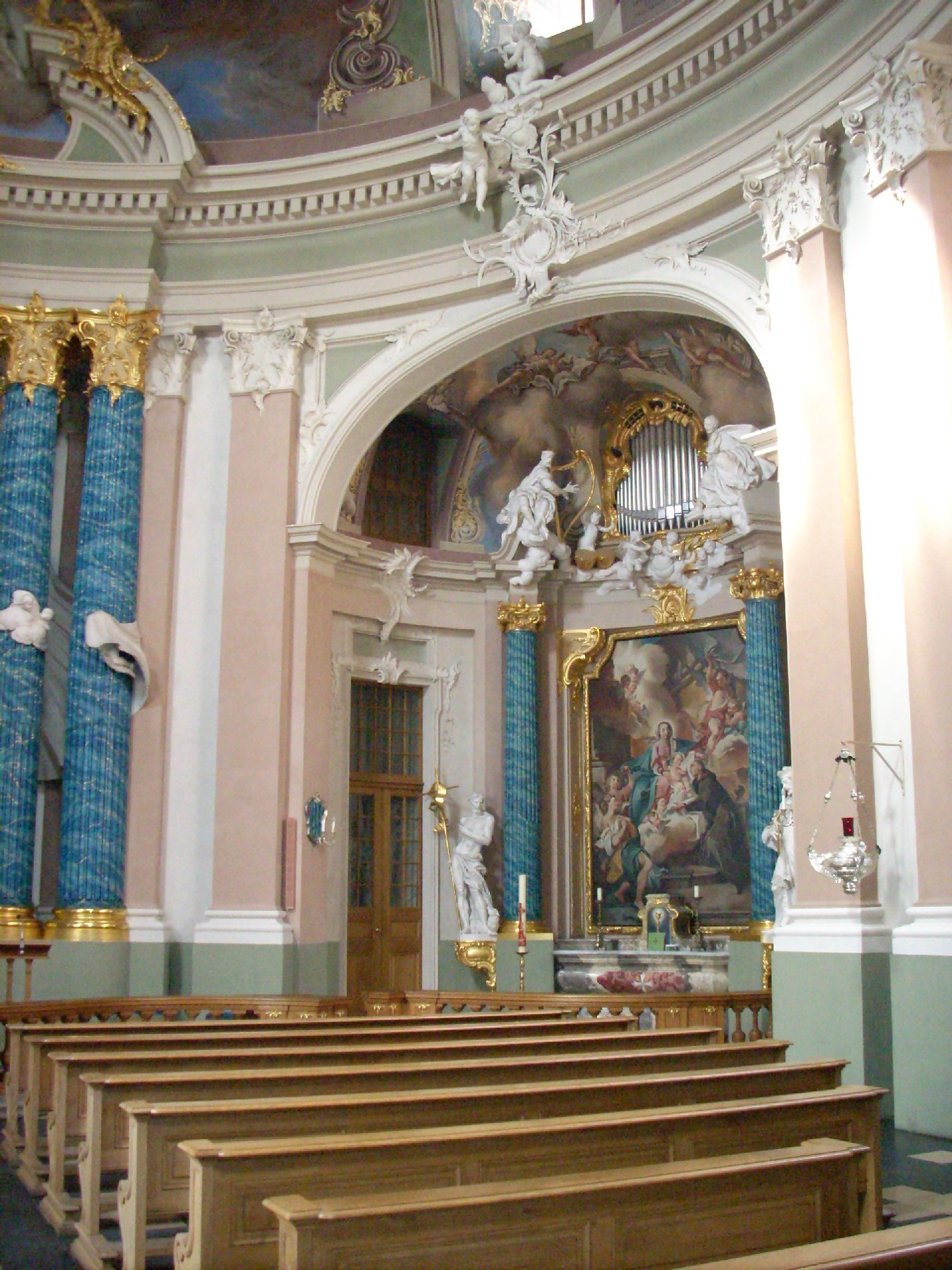 St. Clemens Münster, rechter Seitenaltar